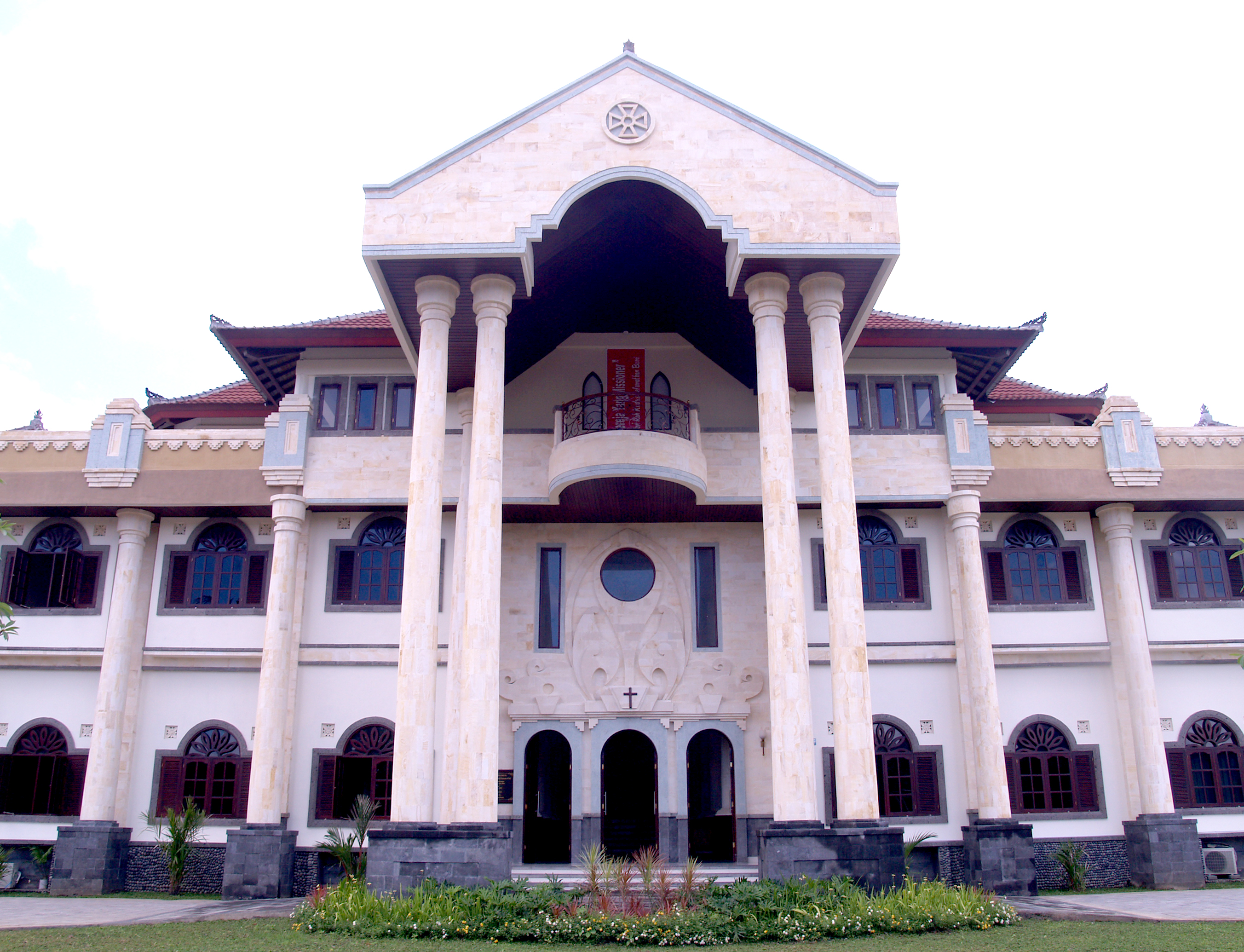 Foto Gedung Kantor Sinode GKPB